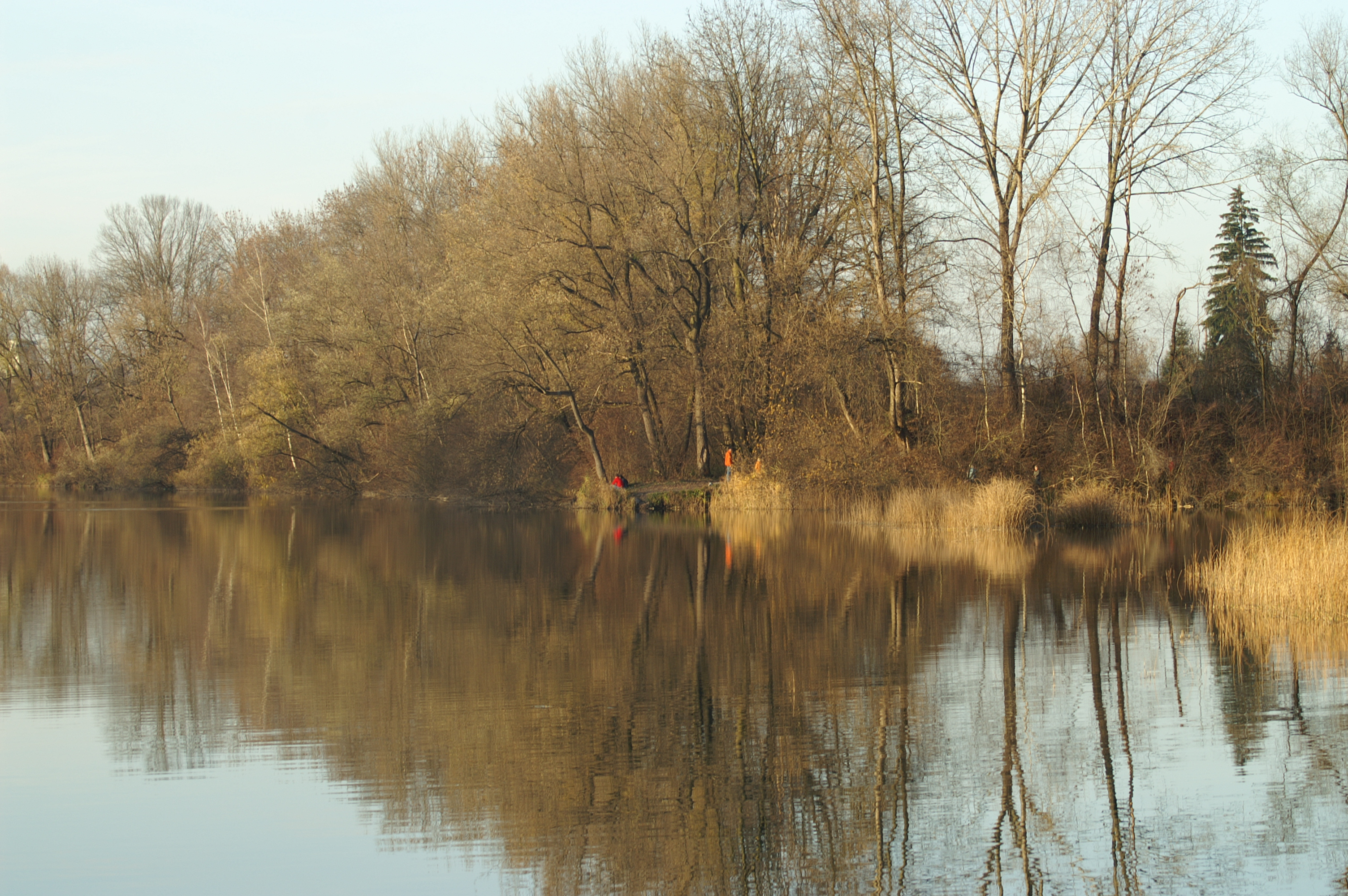 Naherholung: alter Rhein bei Diepoldsau an der Grenze von Österreich zur Schweiz. Veröffentlicht: Georg Kessler in "Freizeit im Ländle, Die schönsten Ausflugziele in Vorarlberg ISBN 978-3-7022-3068-5 2010